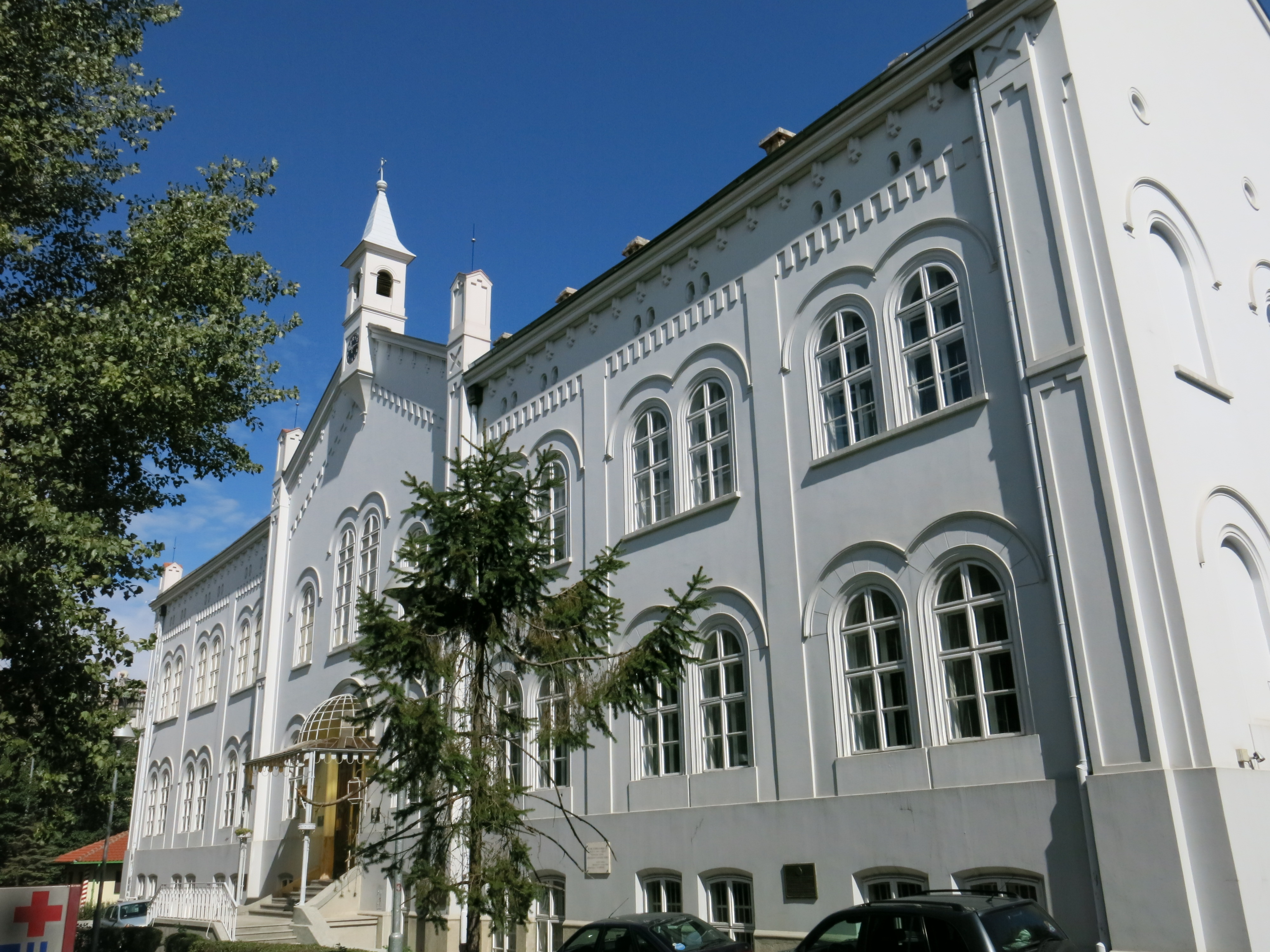 Прва варошка болница